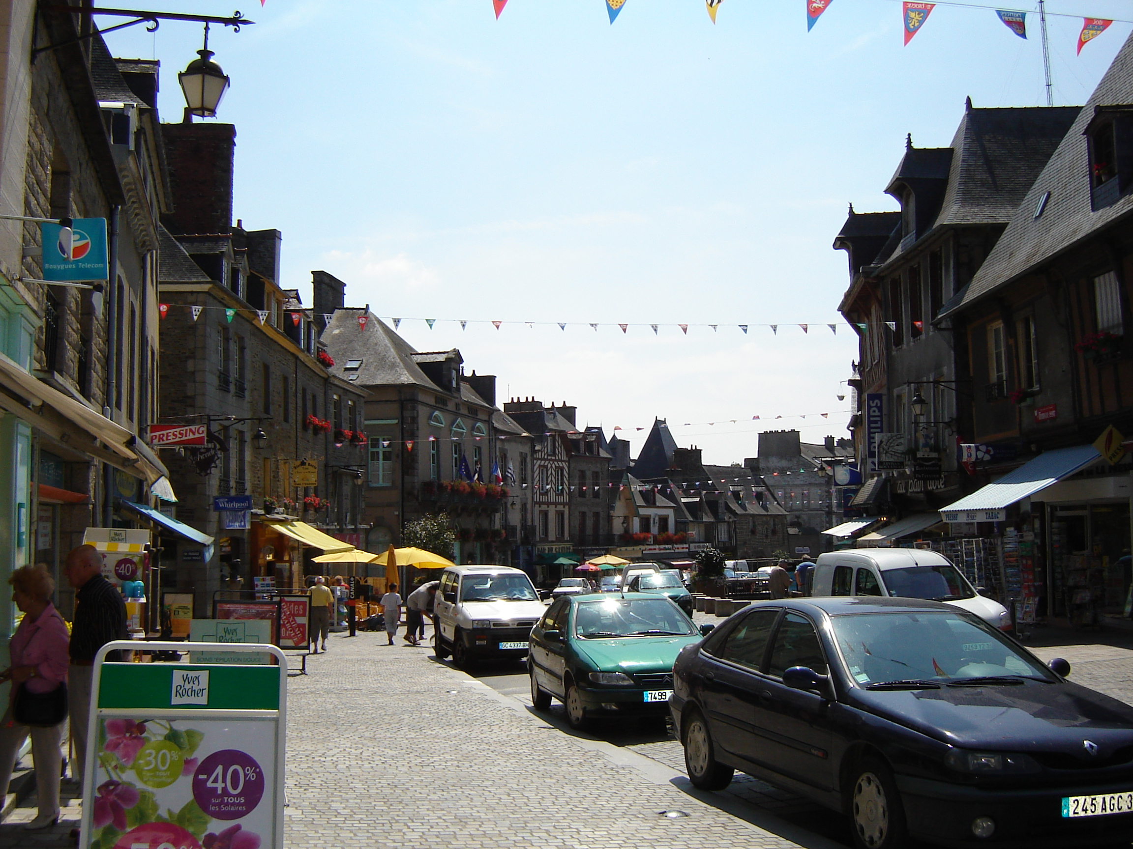 La Grande Rue (main street), Dol-de-Bretagne, Ille-et-Vilaine, Bretagne, France.